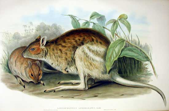 Lagorchestes conspicillatus = L. leichhardti